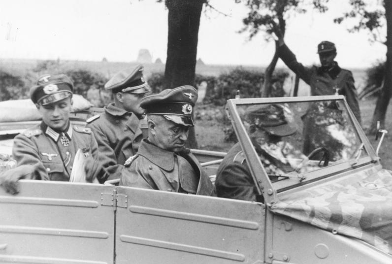 Scherl: Raum Aachen, 9.10.1944 Generalfeldmarschall Model besucht den vorgeschobenen Gef.Std. der in und um Aachen eingesetzten 246. Volksgrenadier-Division. Die Aufnahmen zeigen den Feldmarschall mit dem Div.Kdr., Oberst Wilk vor dem in einem Westwallbunker untergebrachten Gef.Std. (kurz vorher ein Volltreffer darauf) und mit dem I/A der Division.